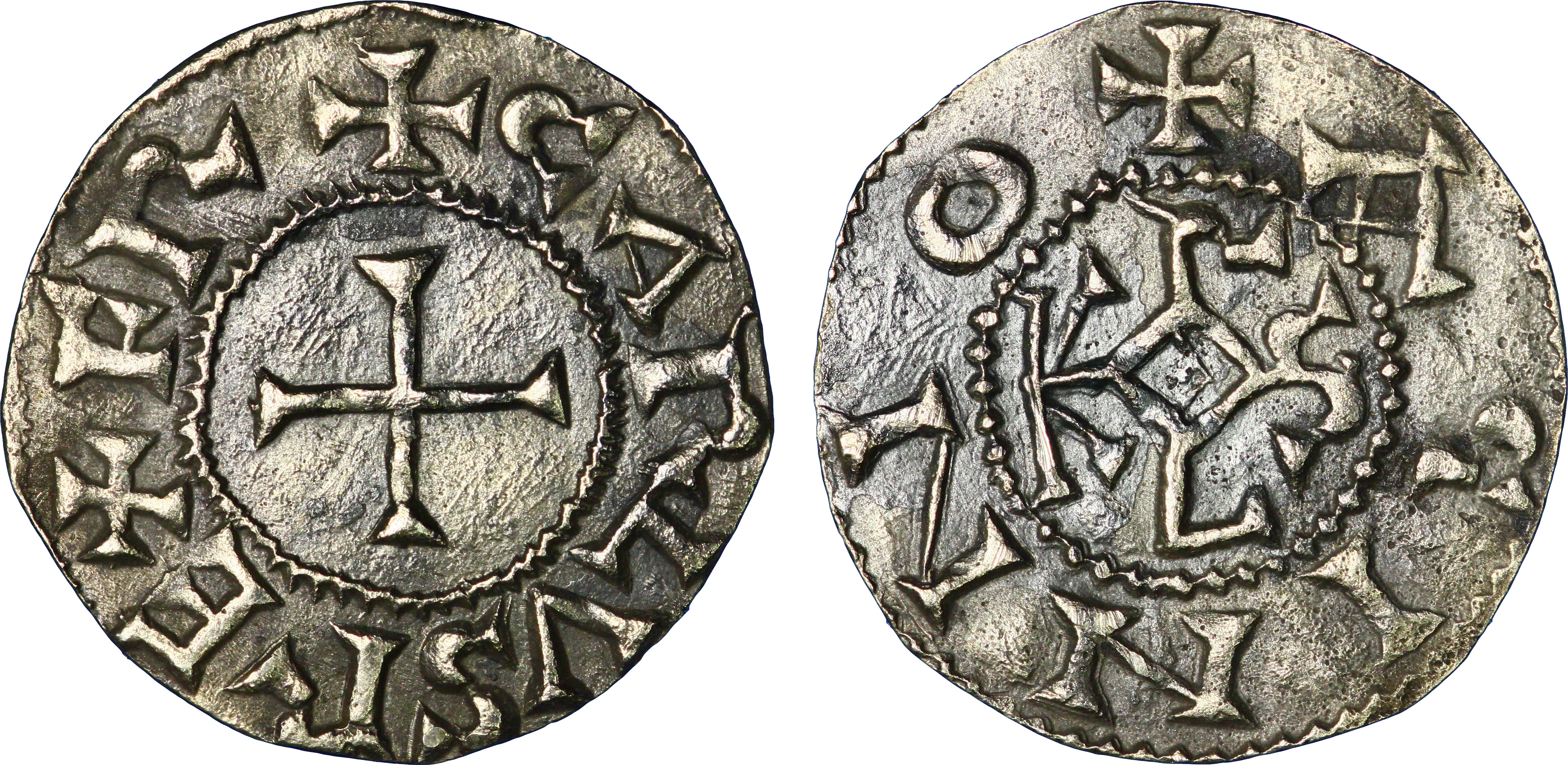 Nom de l'atelier : Agen Métal : argent Diamètre : 21mm Axe des coins : 11h. Poids : 1,36g. Titulature avers : + CARLVS REX FR. Description avers : Croix. Traduction avers : (Charles, roi des Francs). Titulature revers : + AGINNO. Description revers : Monogramme carolin (KAROLVS). Traduction revers : (Agen).